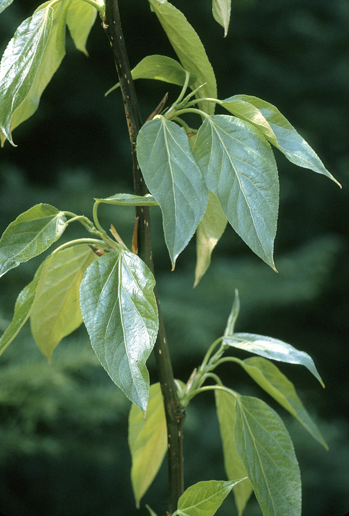 Populus balsamifera L. - balsam poplar